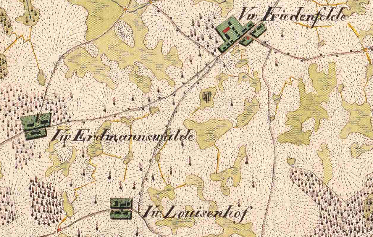 Friedenfelde Erdmannswalde, Gem. Gerswalde, und Luisenhof, Gem. Milmersdorf, Lkr. Uckermark, Brandenburg, Ausschnitt aus dem Urmesstischblatt 2848 Gerswalde von 1826